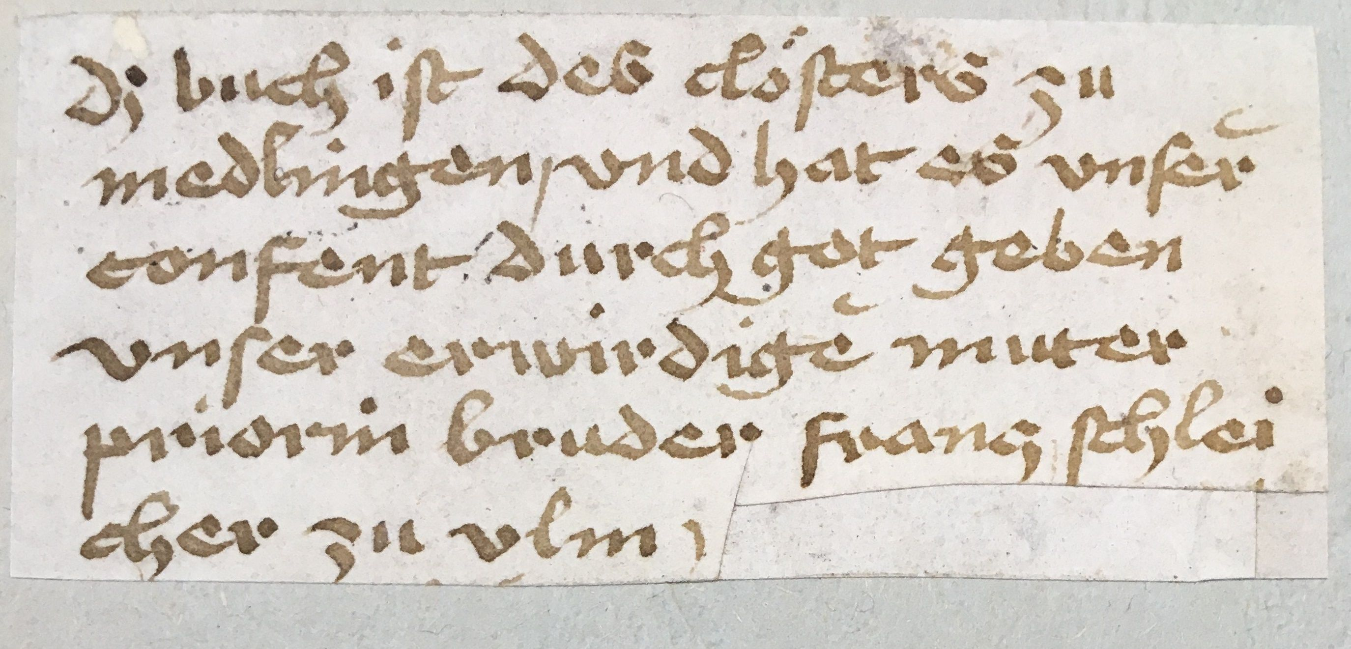 Eignervermerk des Richenbach-Einbands für Margarete Schleicher